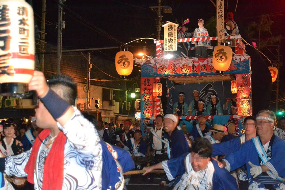 土崎港曳山まつり